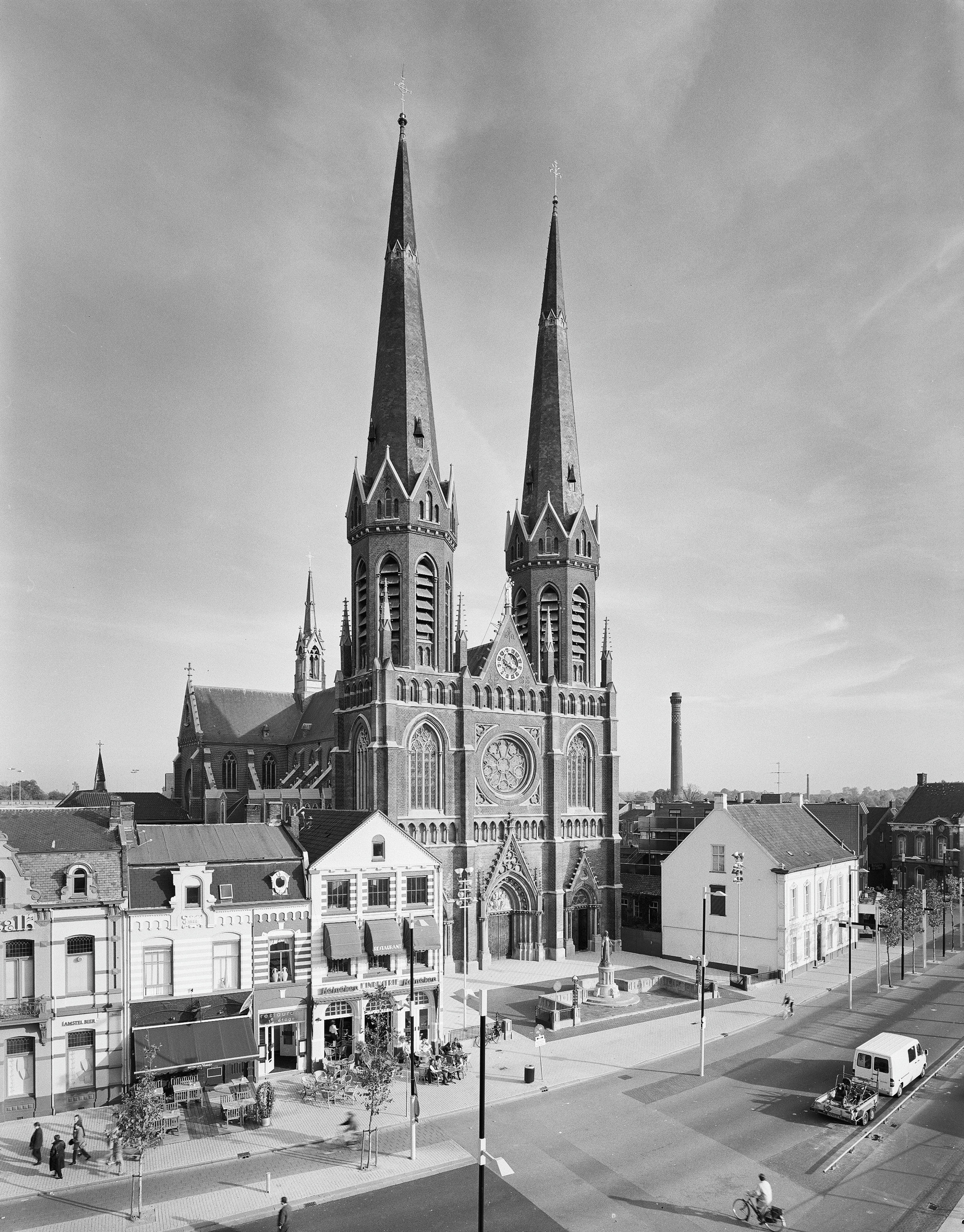 Sint Jozefkerk: Overzicht voorzijde kerk met omgeving (opmerking: Gefotografeerd voor MIP Tilburg, bladzijde 67)